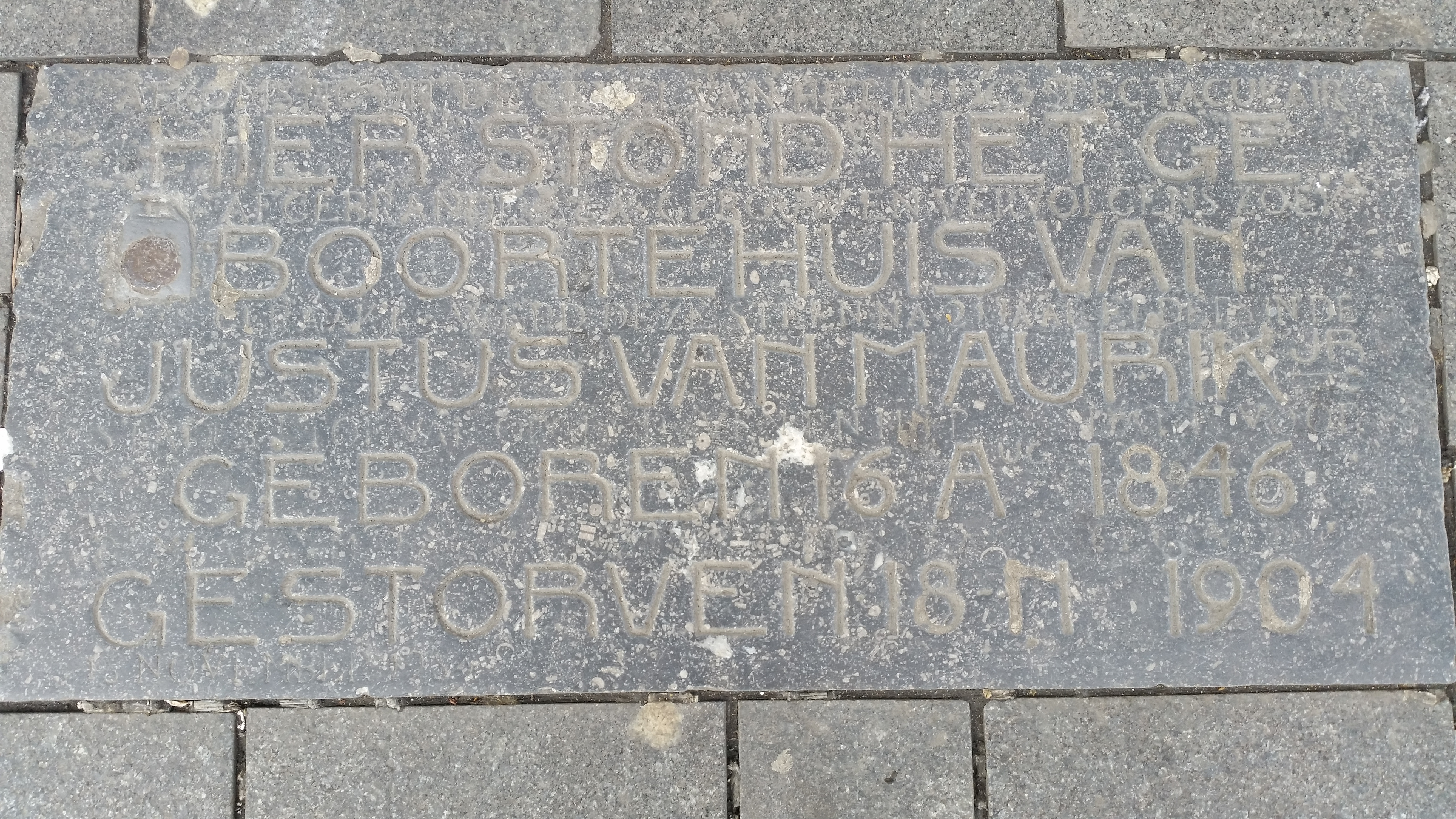 Tegel bij Damrak 74 Amsterdam om aan te geven dat hier het geboortehuis stond van Justus van Maurik jr. Tegel geplaatst circa 1907